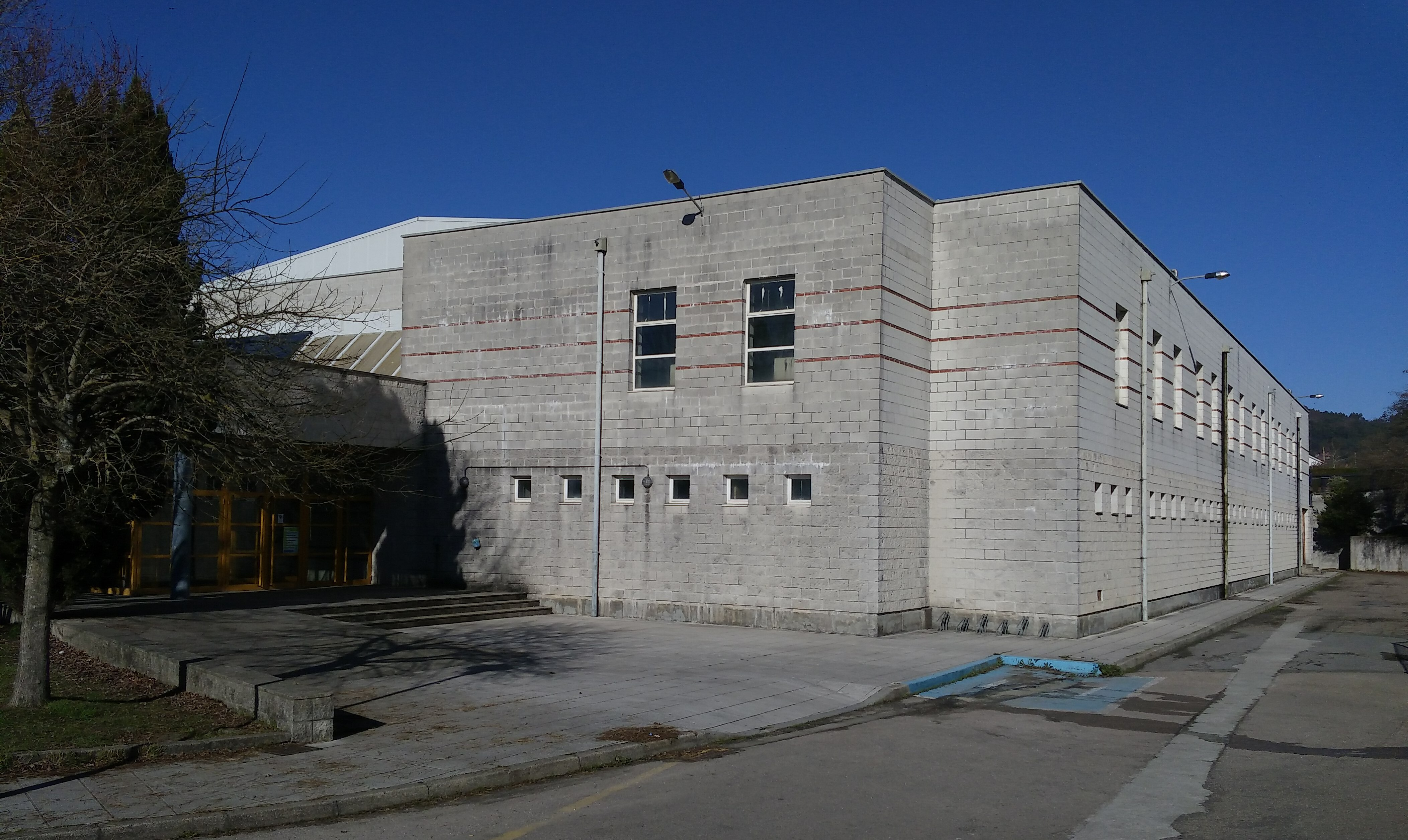 Ver título